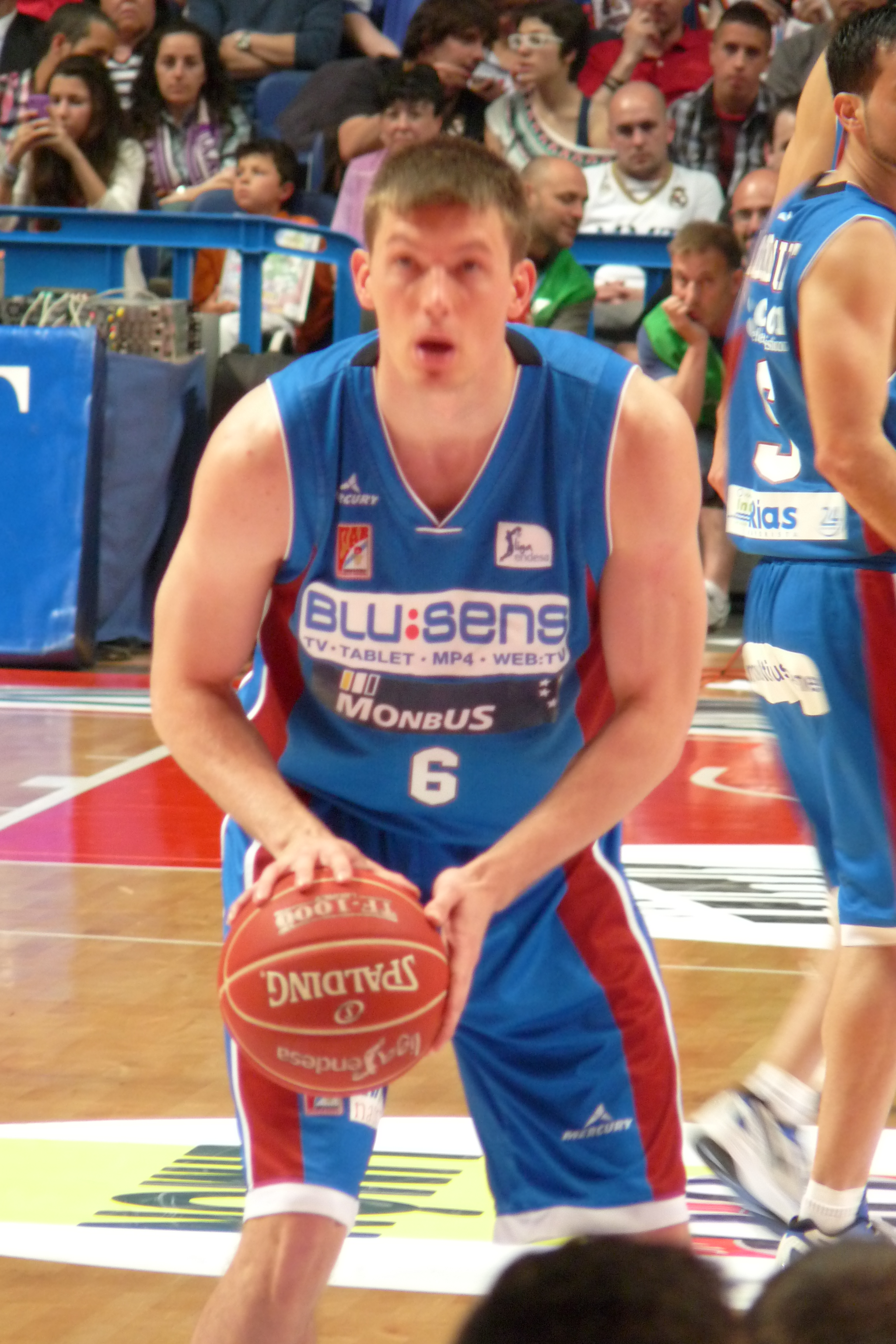 Pavel Pumprla